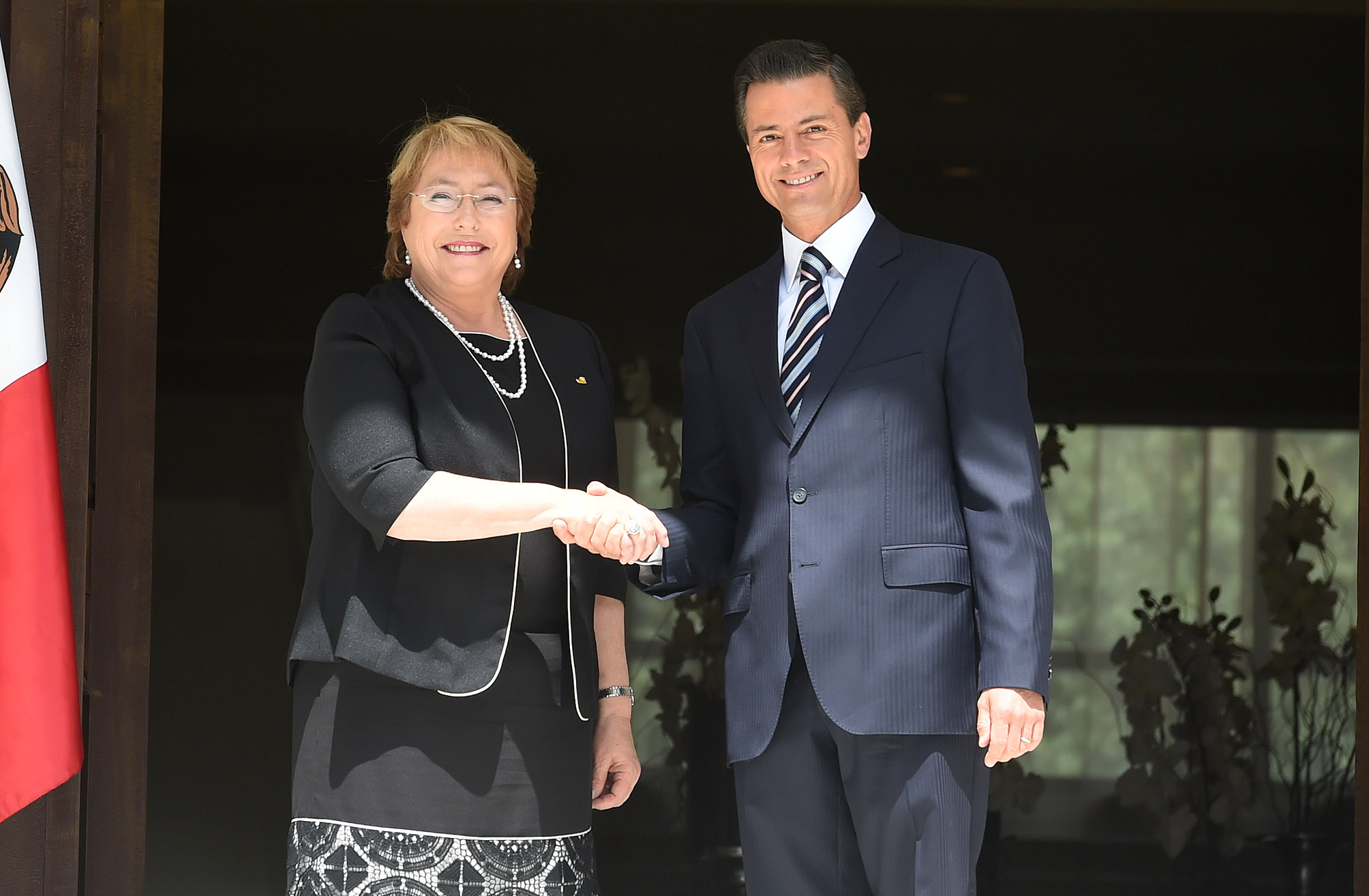 Gobierno de Chile